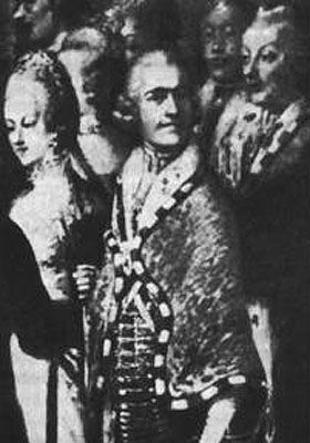 Forrás: Bessenyei György